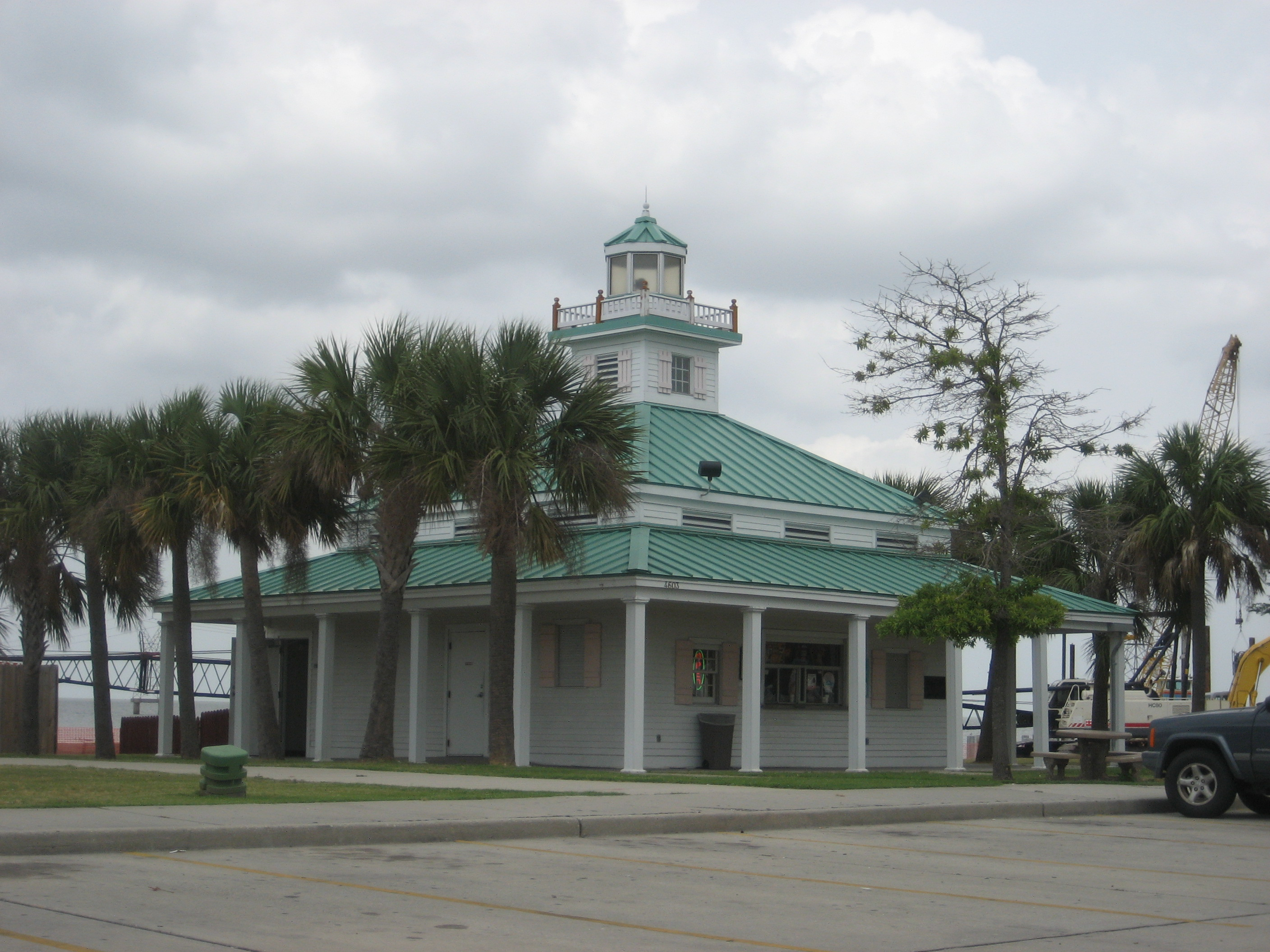 Kenner, Louisiana.